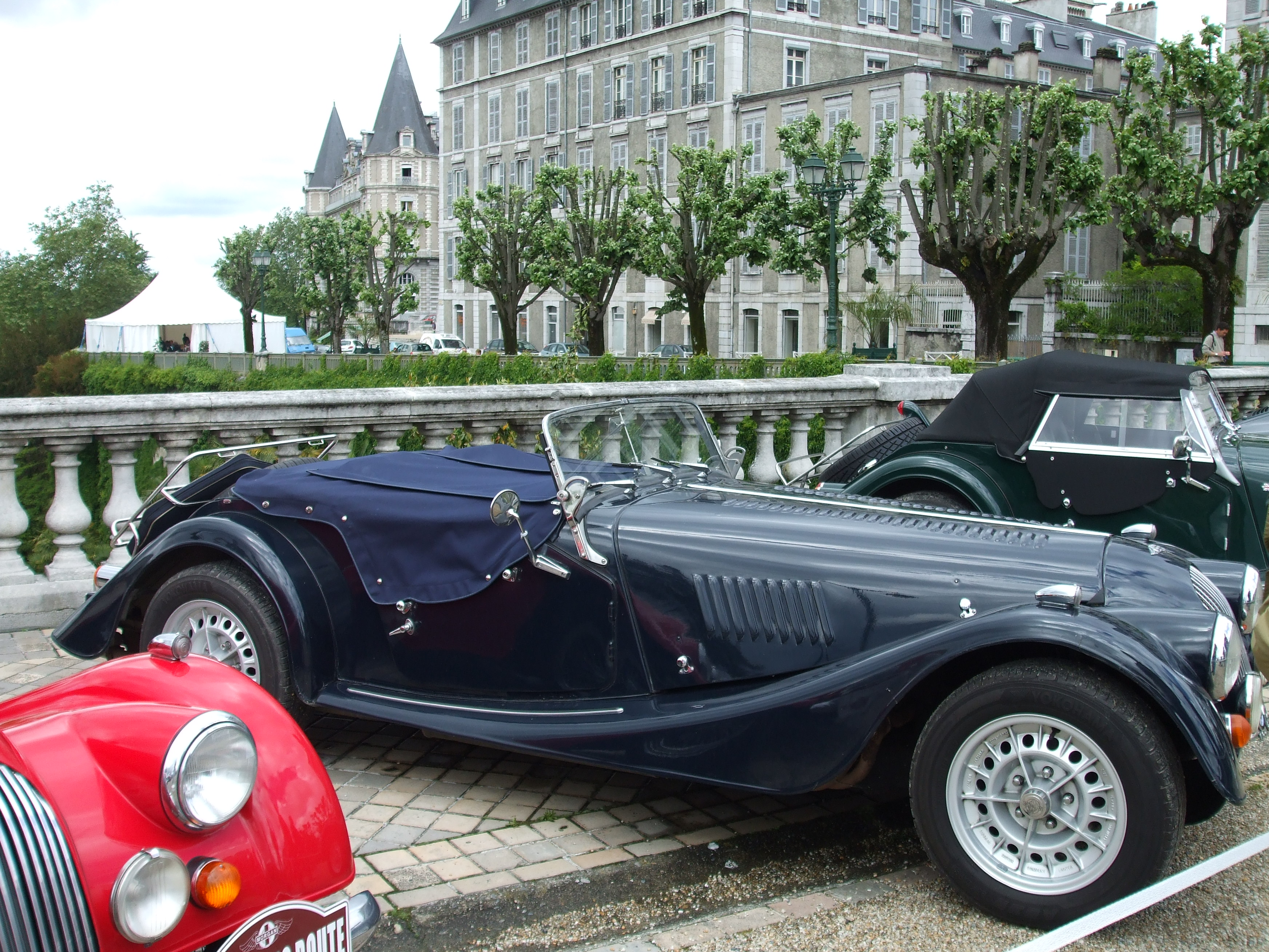 Exposition de voitures de collection Morgan (au milieu: Plus 8) lors du Grand Prix Historiqe de Pau (Pyrénérs Atlantiques)